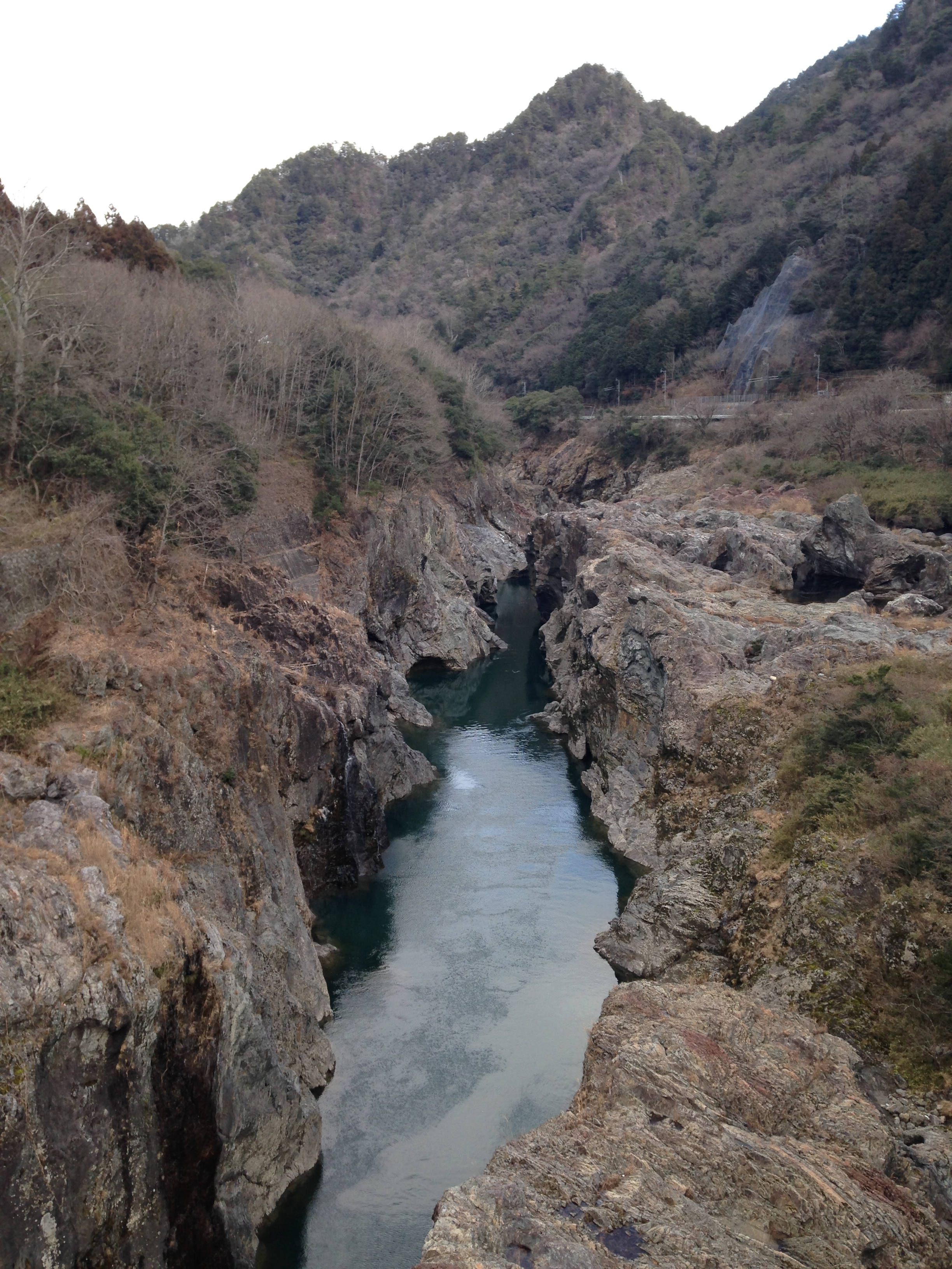 上麻生橋から望む飛水峡(上流側)